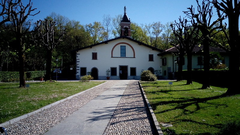 Valbrembo, Santuario della Madonna della Castagna